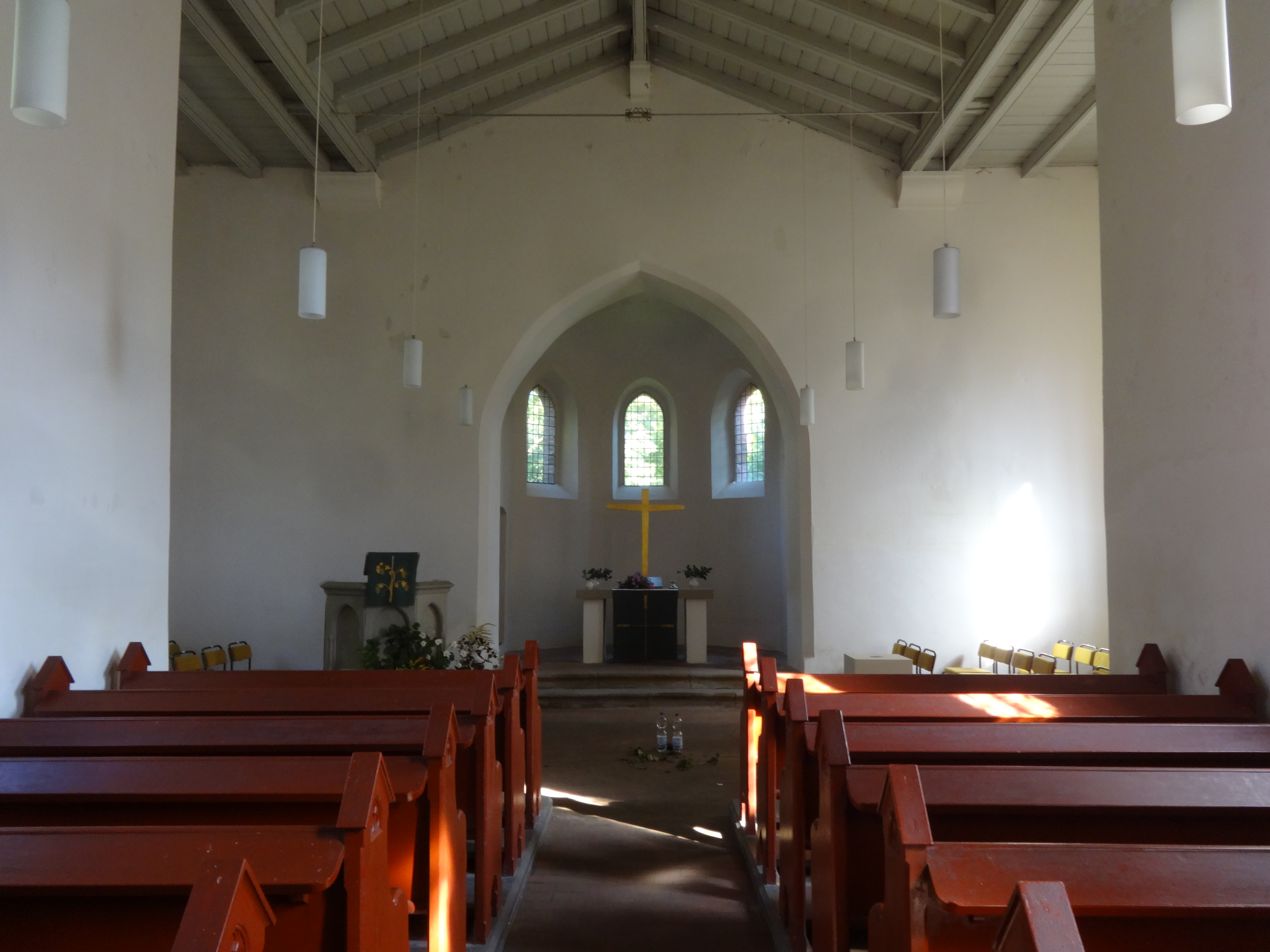 Die Dorfkirche Sauen ist ein mittelalterlicher Feldsteinbau in der Gemeinde Rietz-Neuendorf im Landkreis Oder-Spree in Brandenburg, der 1896 überformt wurde. Im Innern befinden sich eine Westempore sowie eine Holzdecke aus der Zeit des Umbaus.